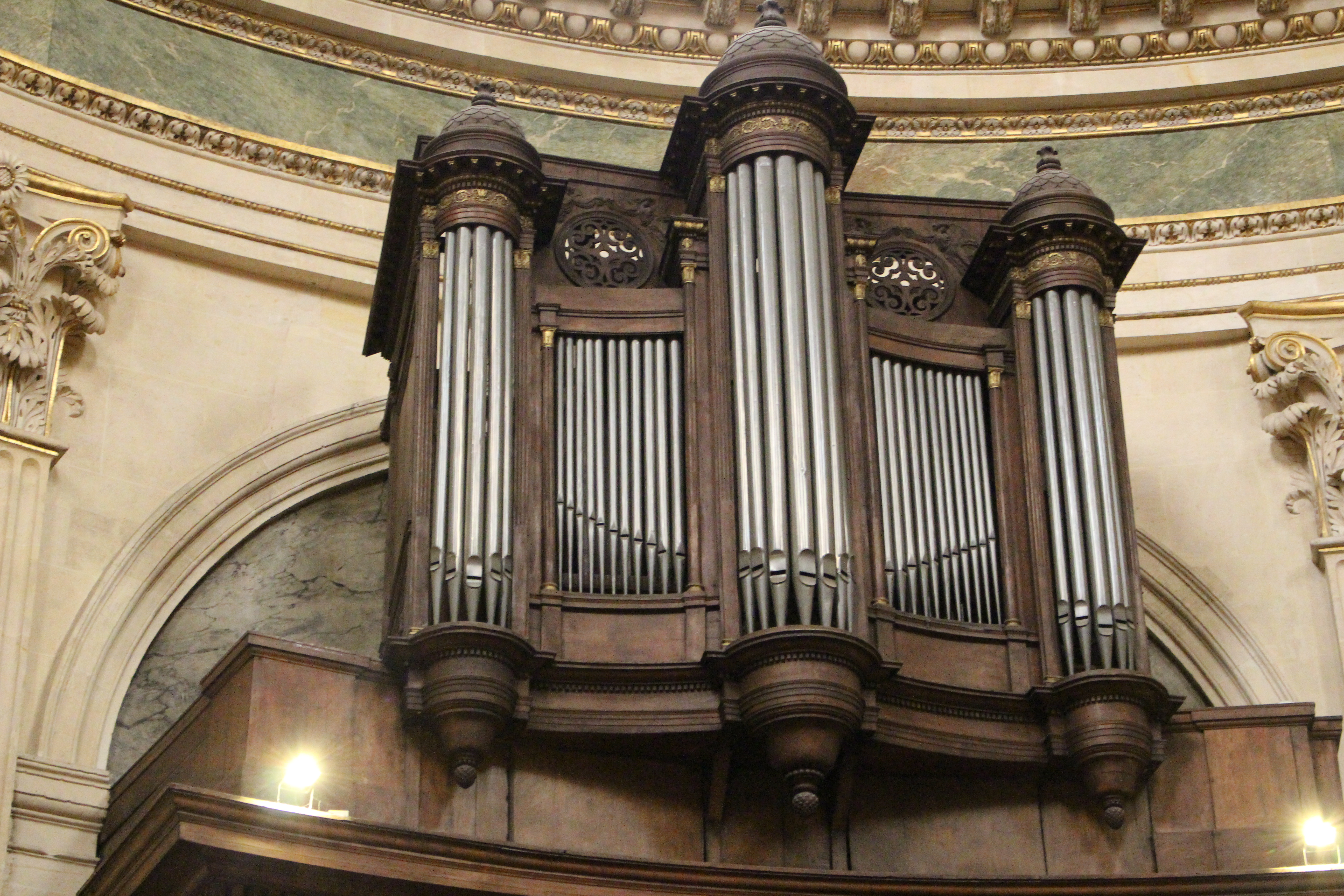 Orgue Cavaillé-Coll de l'église polonaise de Paris, l'église Notre-Dame de l'Assomption (Paris 1er)